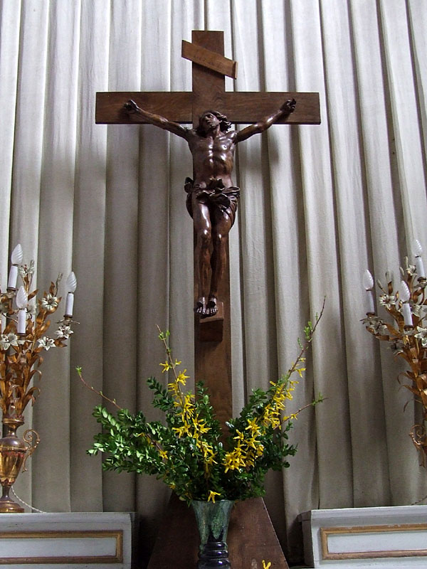 Christ en croix du maître-autel de l'église d'Étais-la-Sauvin (Yonne)